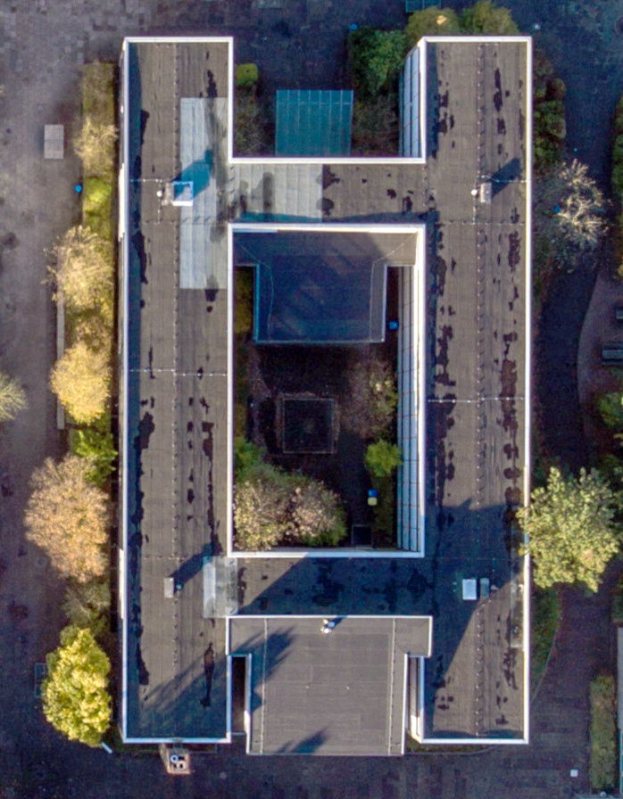 Luftaufnahme des Gymnasiums Grootmoor, nur H-Gebäude.